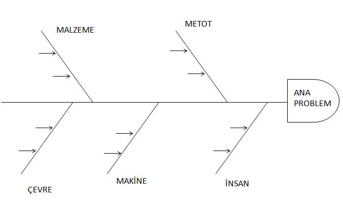 balık kılçığı diyagramı